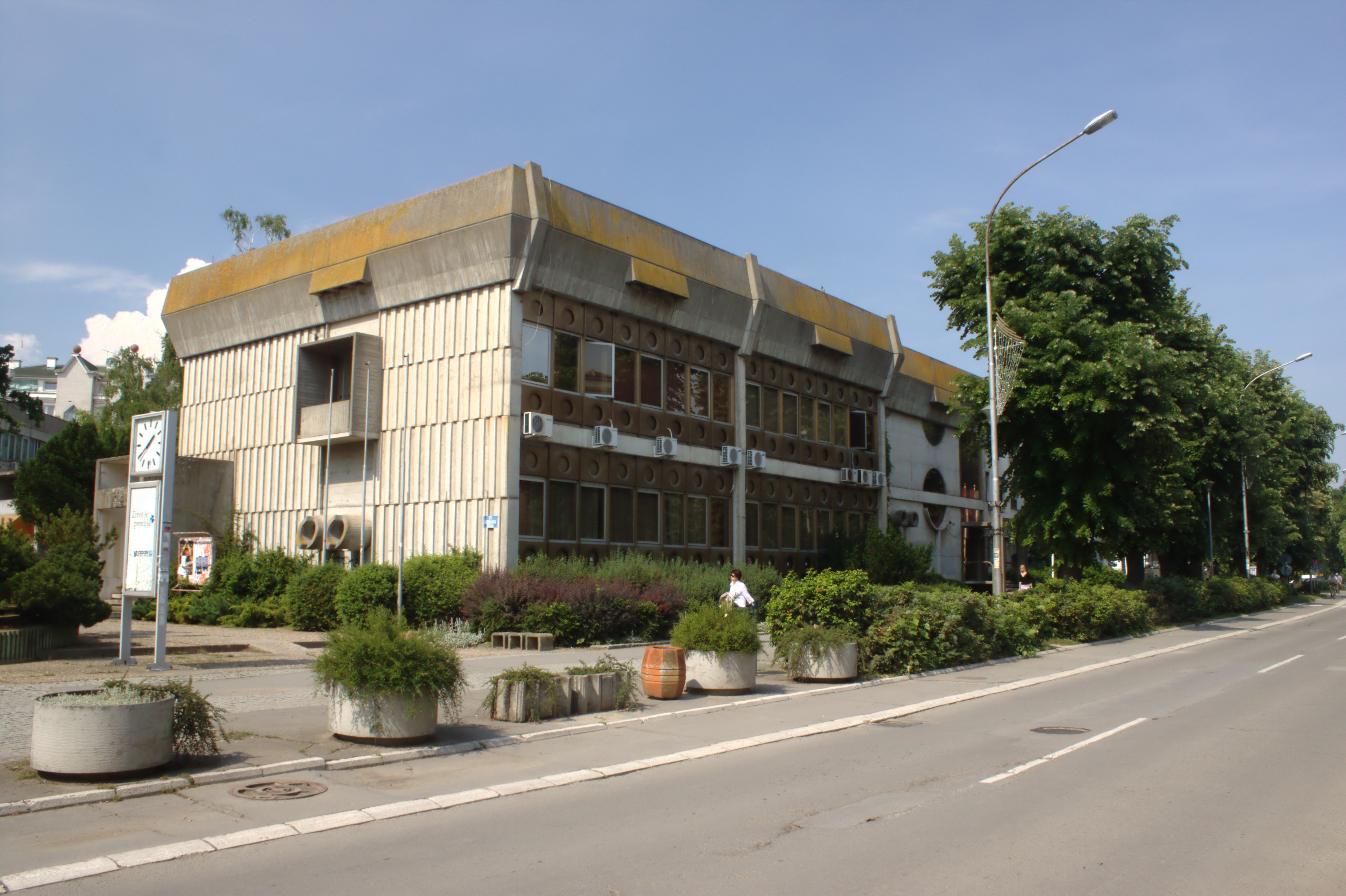 Zgrada opštine u Sremskoj Mitrovici